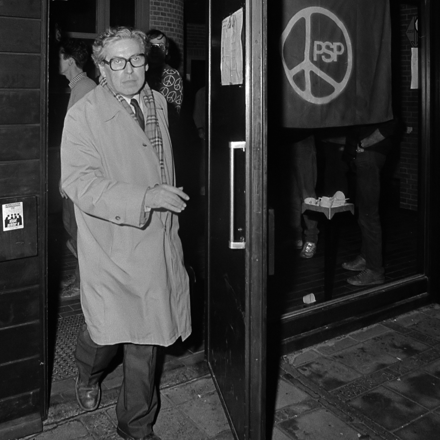 Wijk aan Zee , PSP-congres; Fred van der Spek verlaat het congres vroegtijdig 14 december 1985